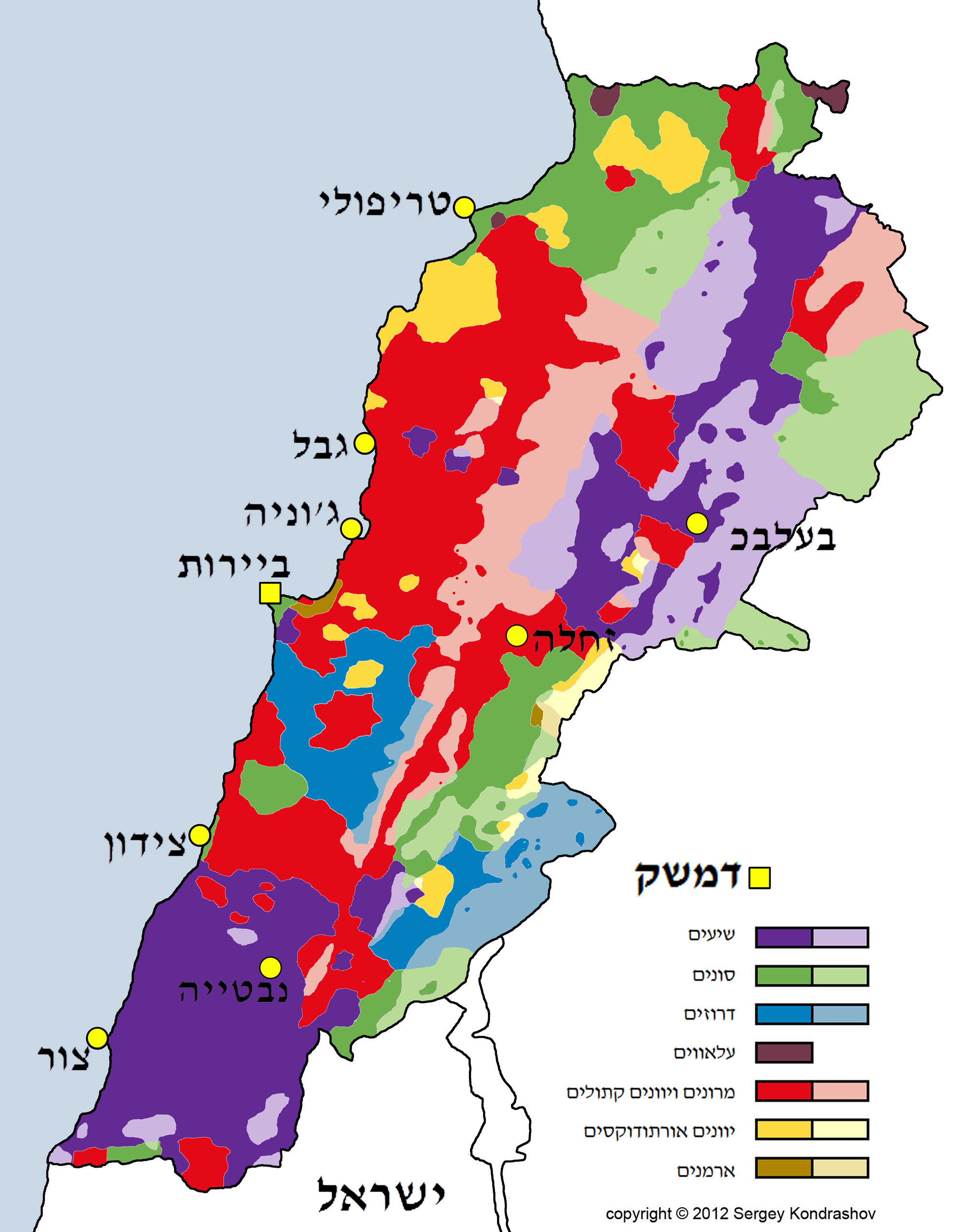 חלוקת קבוצות דת של לבנון